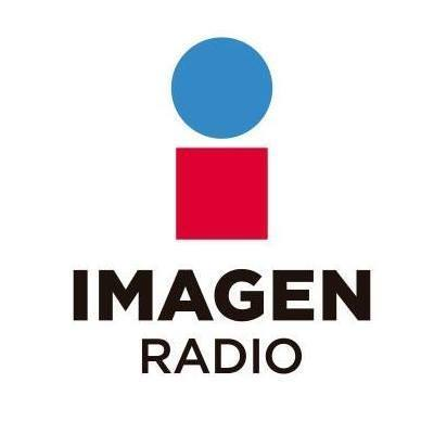 Logotipo de Imagen Radio de Grupo Imagen 2016